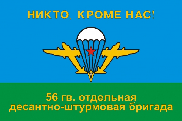 56-я гвардейская отдельная десантно-штурмовая бригада